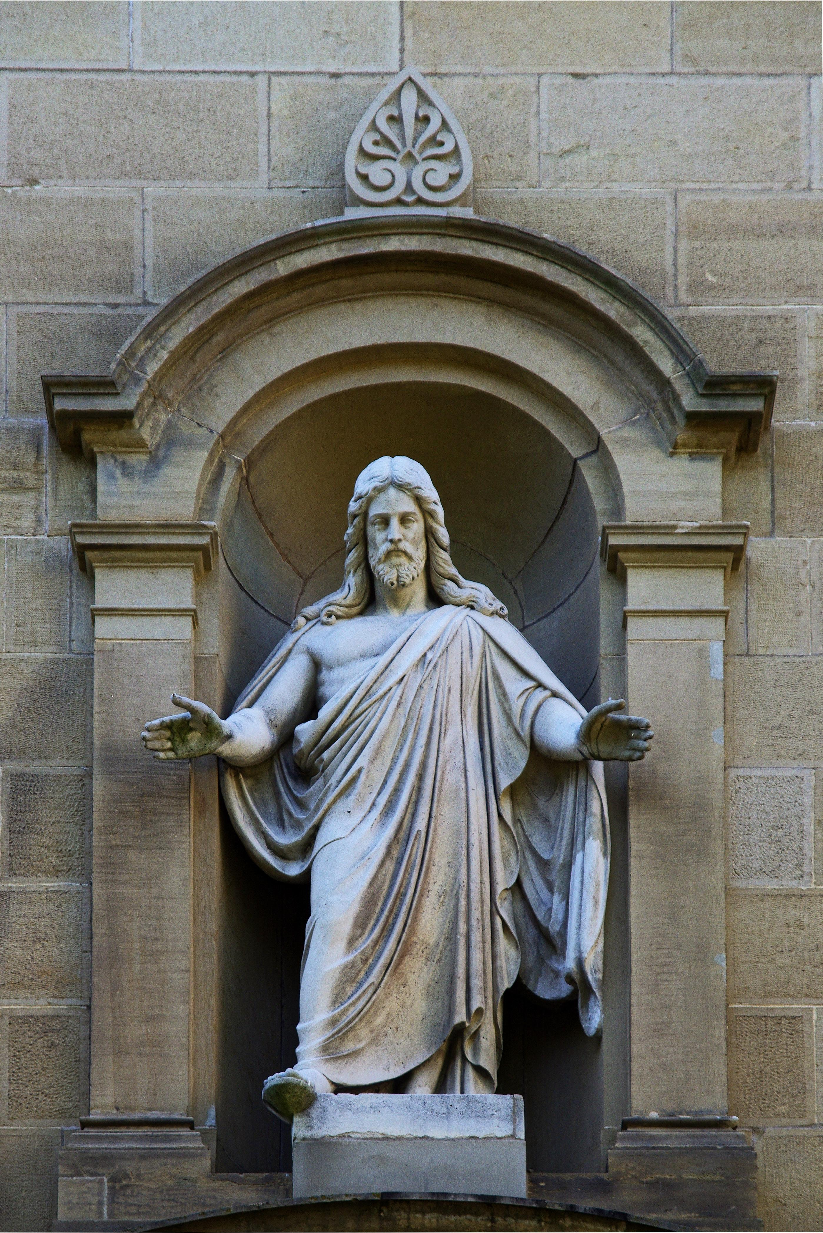 Christustatue von Seitz an der Christuskirche in Freiburg